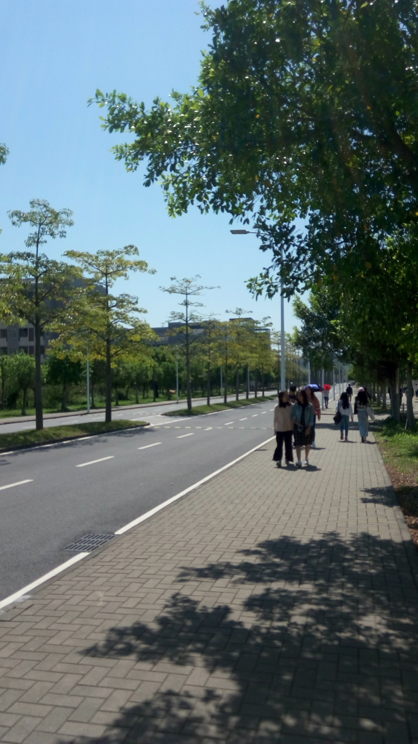 中文（中国大陆）: 广东南华工商职业学院博雅大道